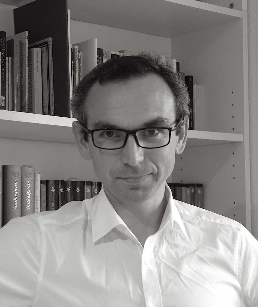 Porträt des Autors und Regisseurs Michael Sommer.